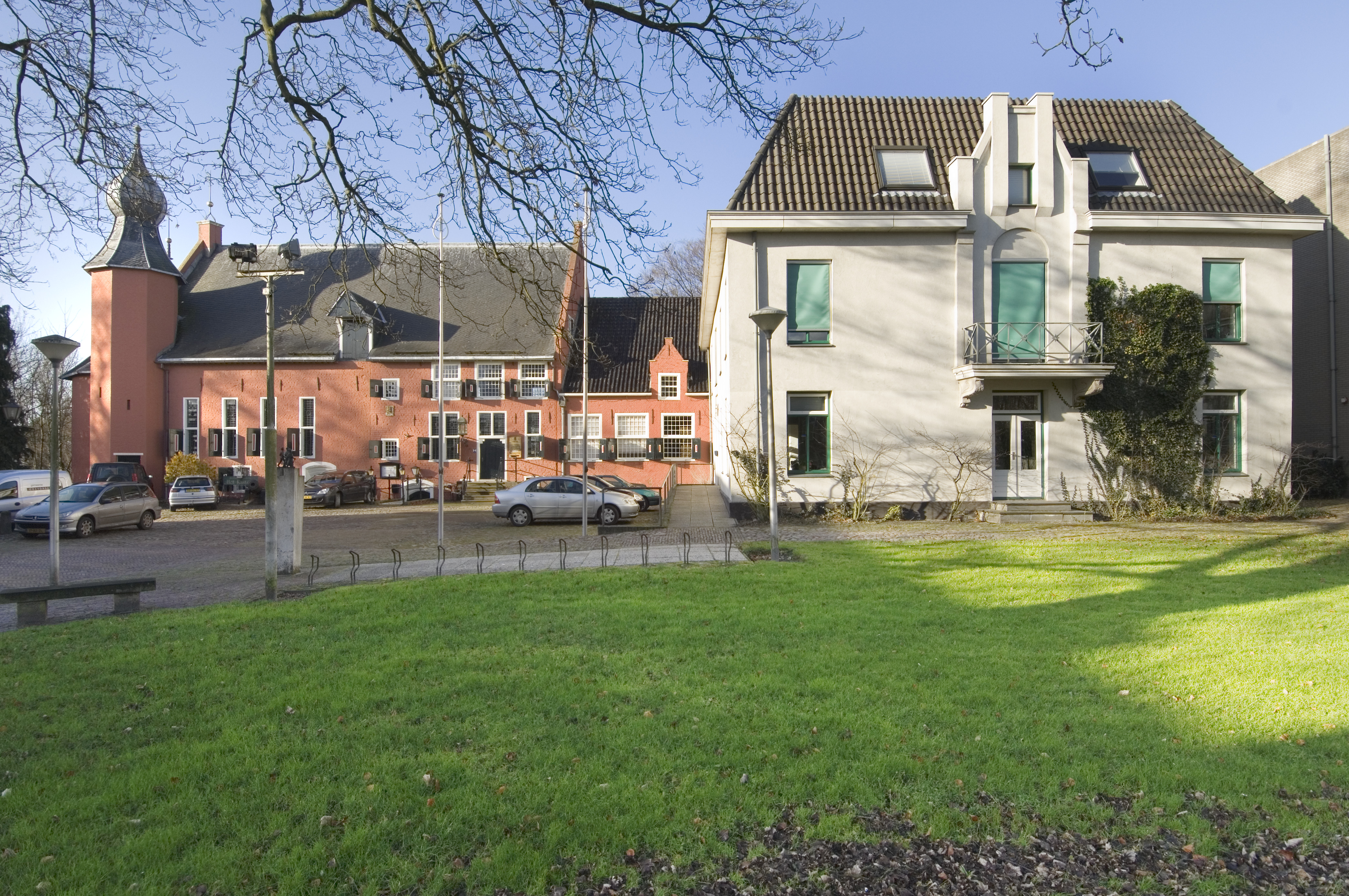 Stadhuis/ Kasteel: Het kasteel en het gemeentehuis (opmerking: Kasteel huisvest momenteel een restaurant en maakt deel uit van het complex van het gemeentehuis)